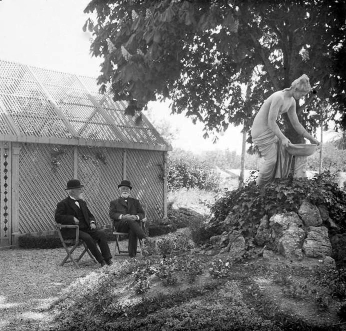 Germans Puig i Valls al seu jardí. Josep Salvany i Blanch (1916)